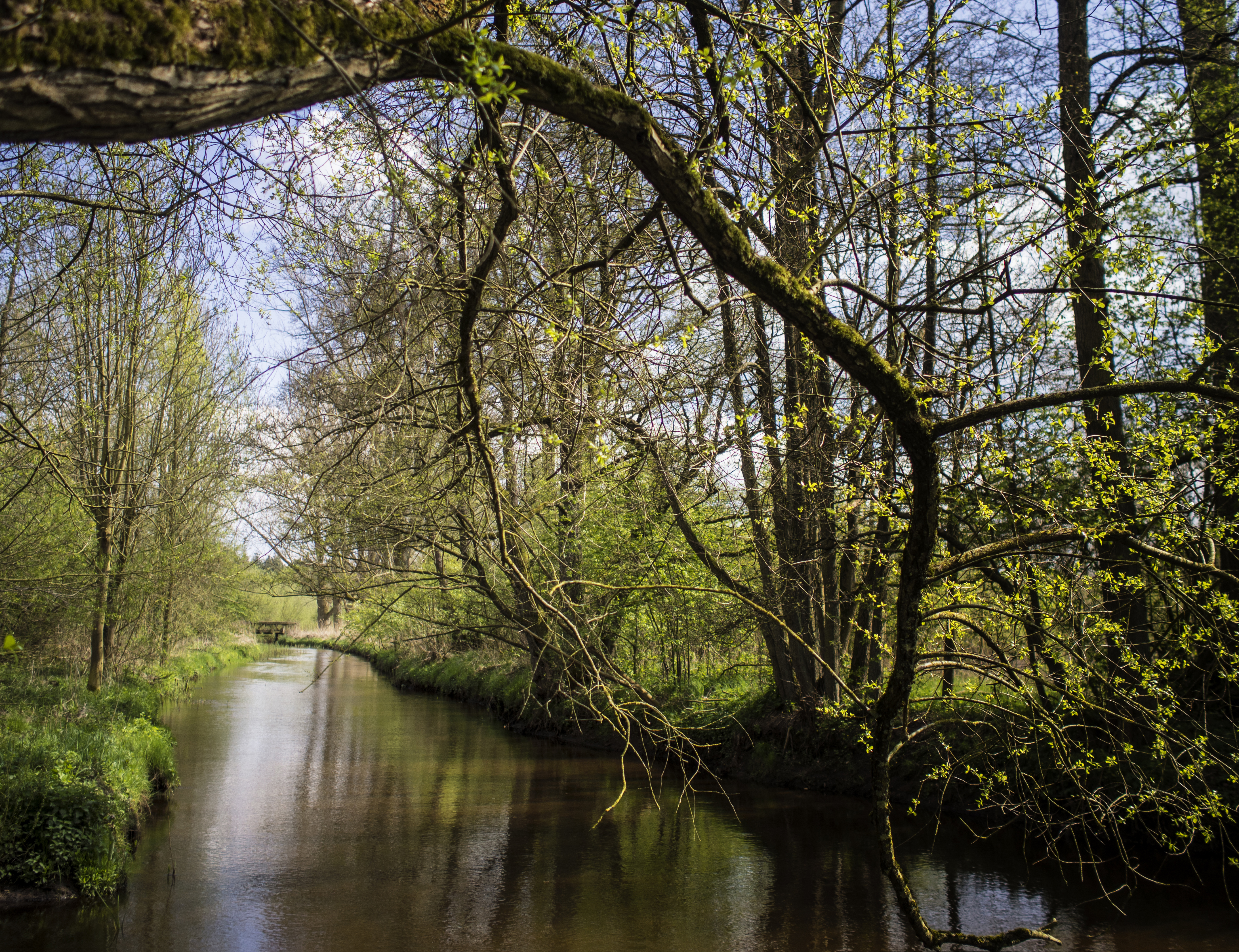 Die Rodau auf den letzten Metern bevor sie in die Wiedau mündet (in Rotenburg/ Wümme)